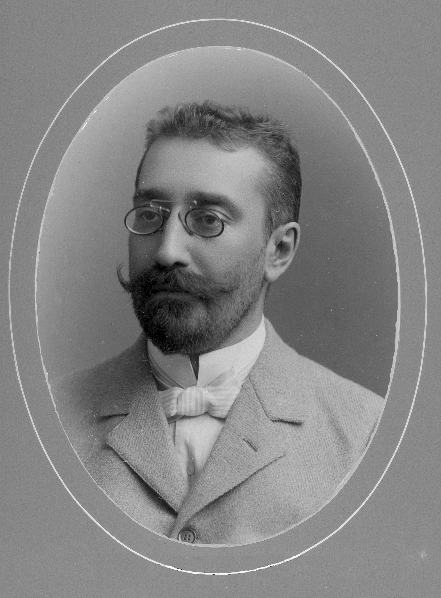 Владимир Тимофеевич Шевяков (1859, Петербург — 18 октября 1930) — известный русский зоолог. С 1908 года — член-корреспондент Императорской Санкт-Петербургской Академии Наук.